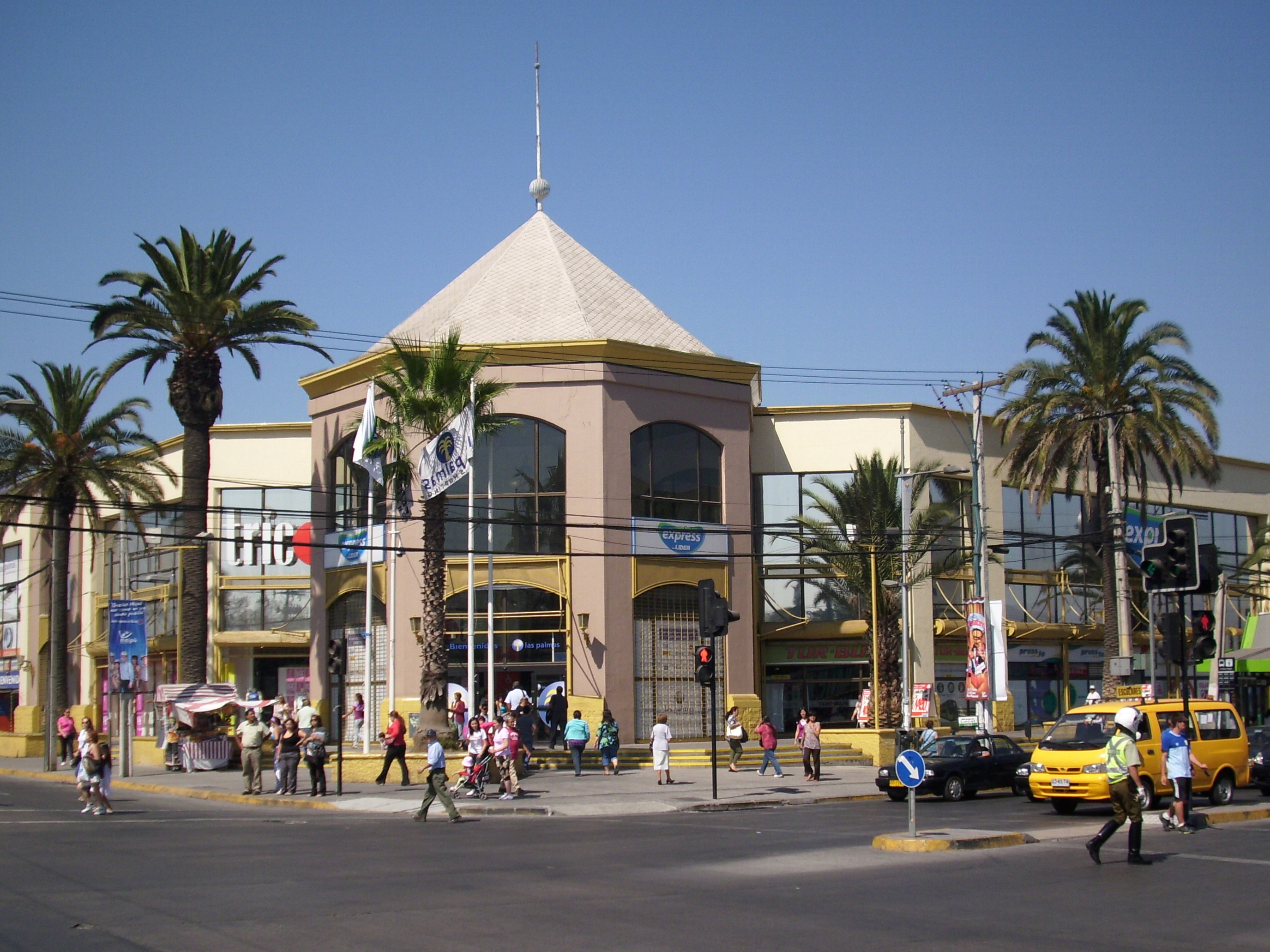 La fachada del Shopping Las Palmas, perteneciente a Rentas e Inversiones Maipú S. A., ubicado en la esquina de las avenidas Pajaritos y 5 de Abril, en la Plaza de Maipú. En su interior hay un supermercado Líder Express, una tienda Tricot y otros locales menores. Santiago de Chile, 3 de febrero de 2011.